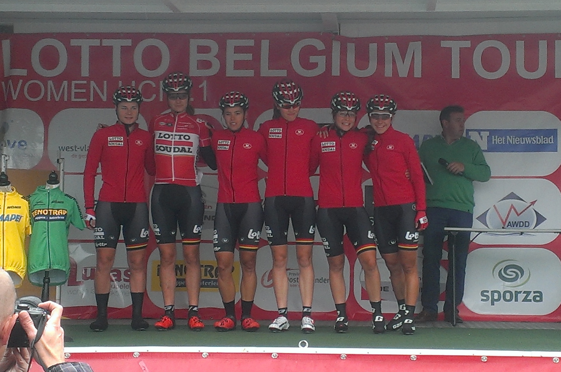 Start van de 3e en laatste etappe van de Lotto Belgium Tour 2017 in Geraardsbergen.